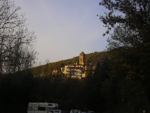 Vista de Espinelves